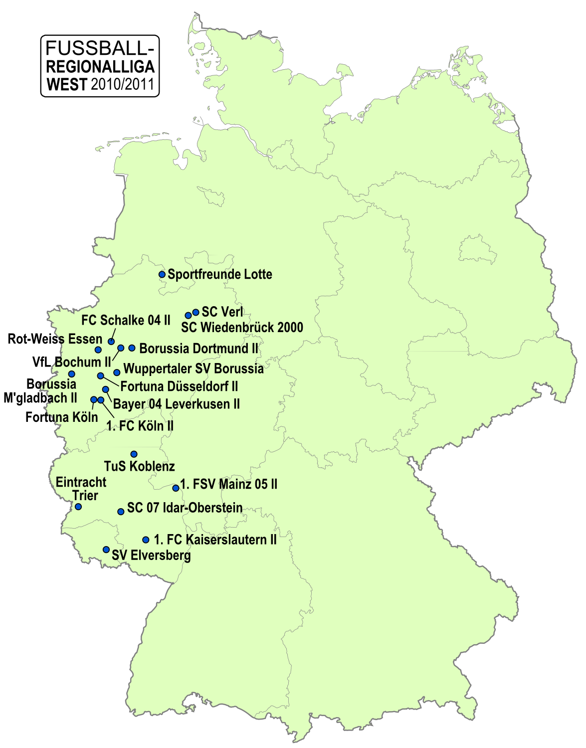 Karte der Vereine der Fußball-Regionalliga West, Saison 2011/2012